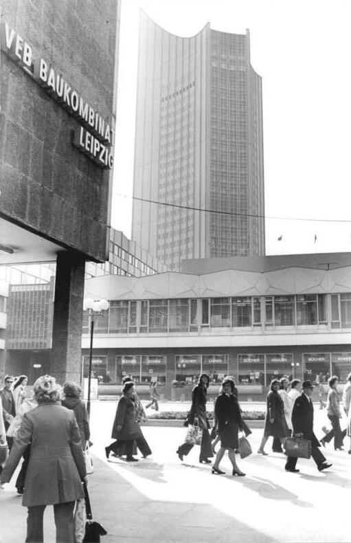 Leipzig, Universitätshochaus, Grimmaische Straße ADN-ZB Gahlbeck 7.11.74 Leipzig: Einkaufsbummel in der Grimmaischen Straße. siehe auch N1107-2N